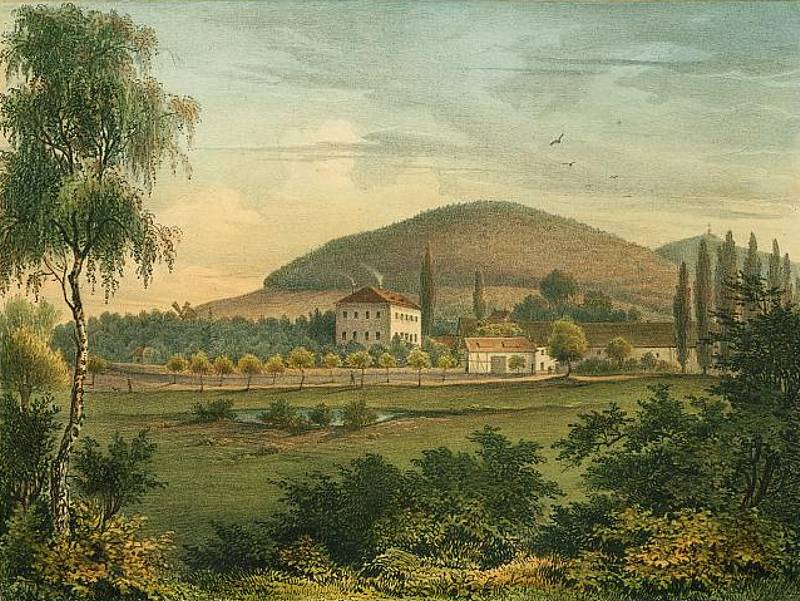 farbige Lithographie um 1860